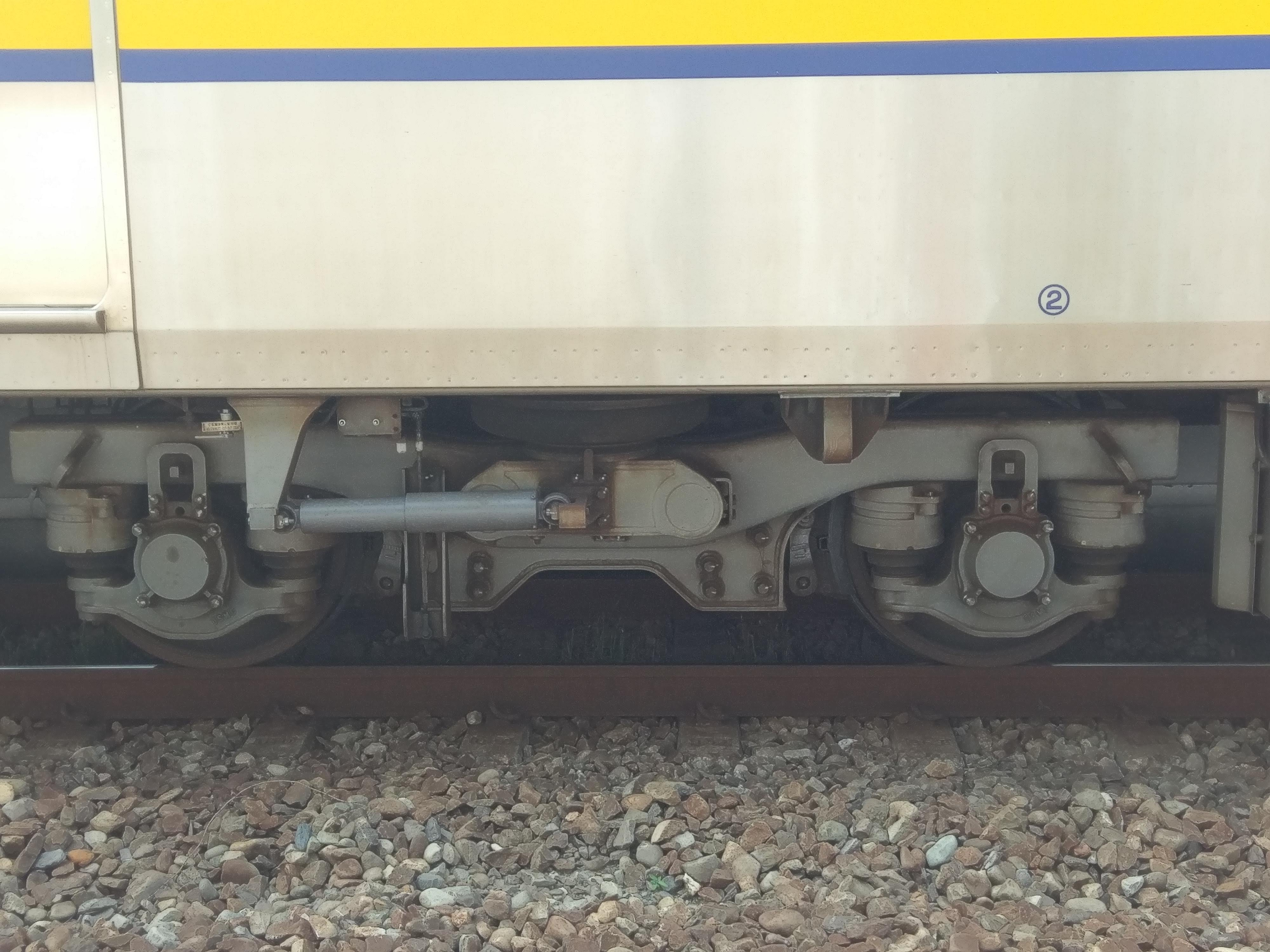 中文（台灣）: 台鐵EMU800型電聯車的轉向架